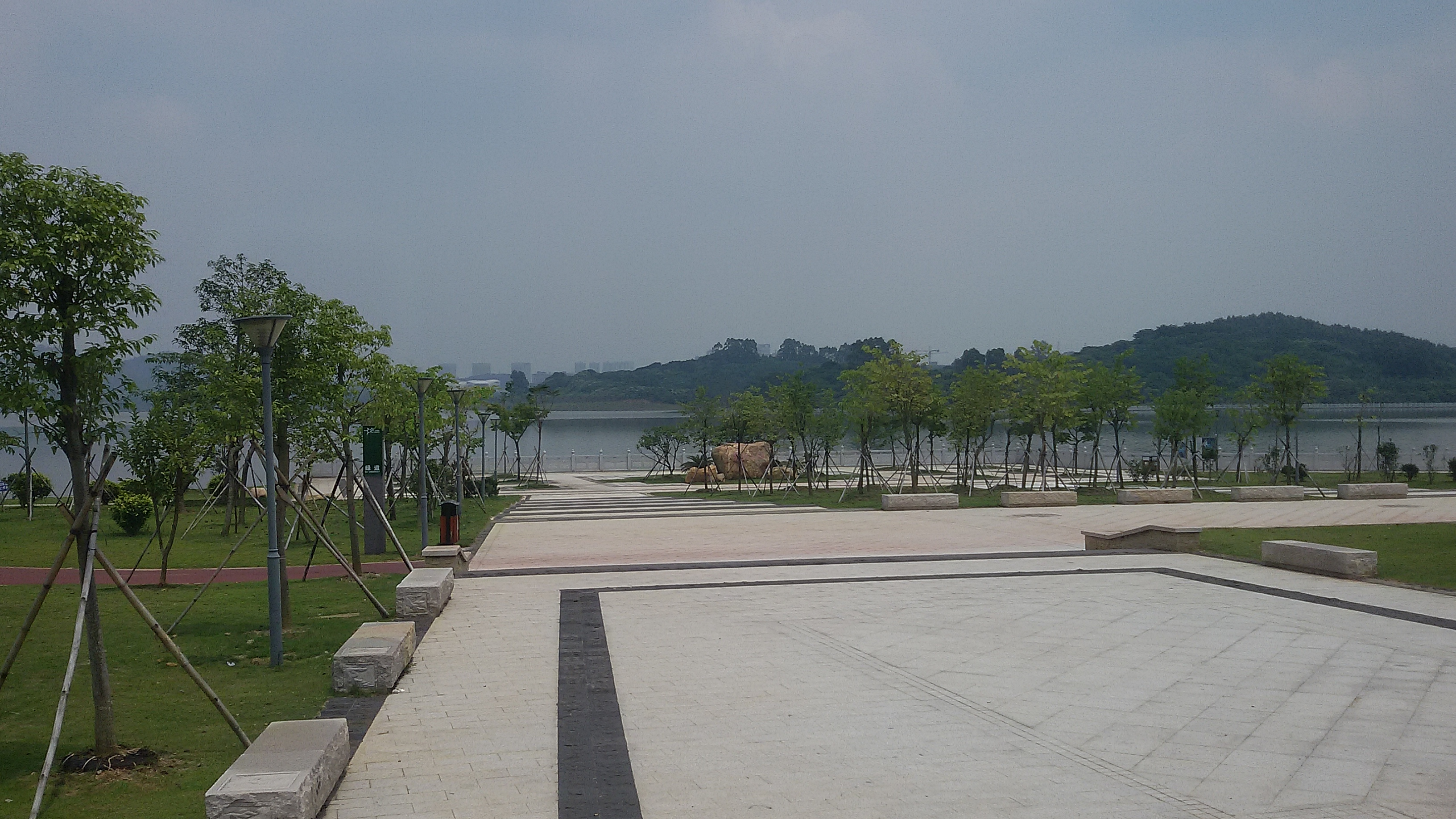 粵語: 增城掛綠湖